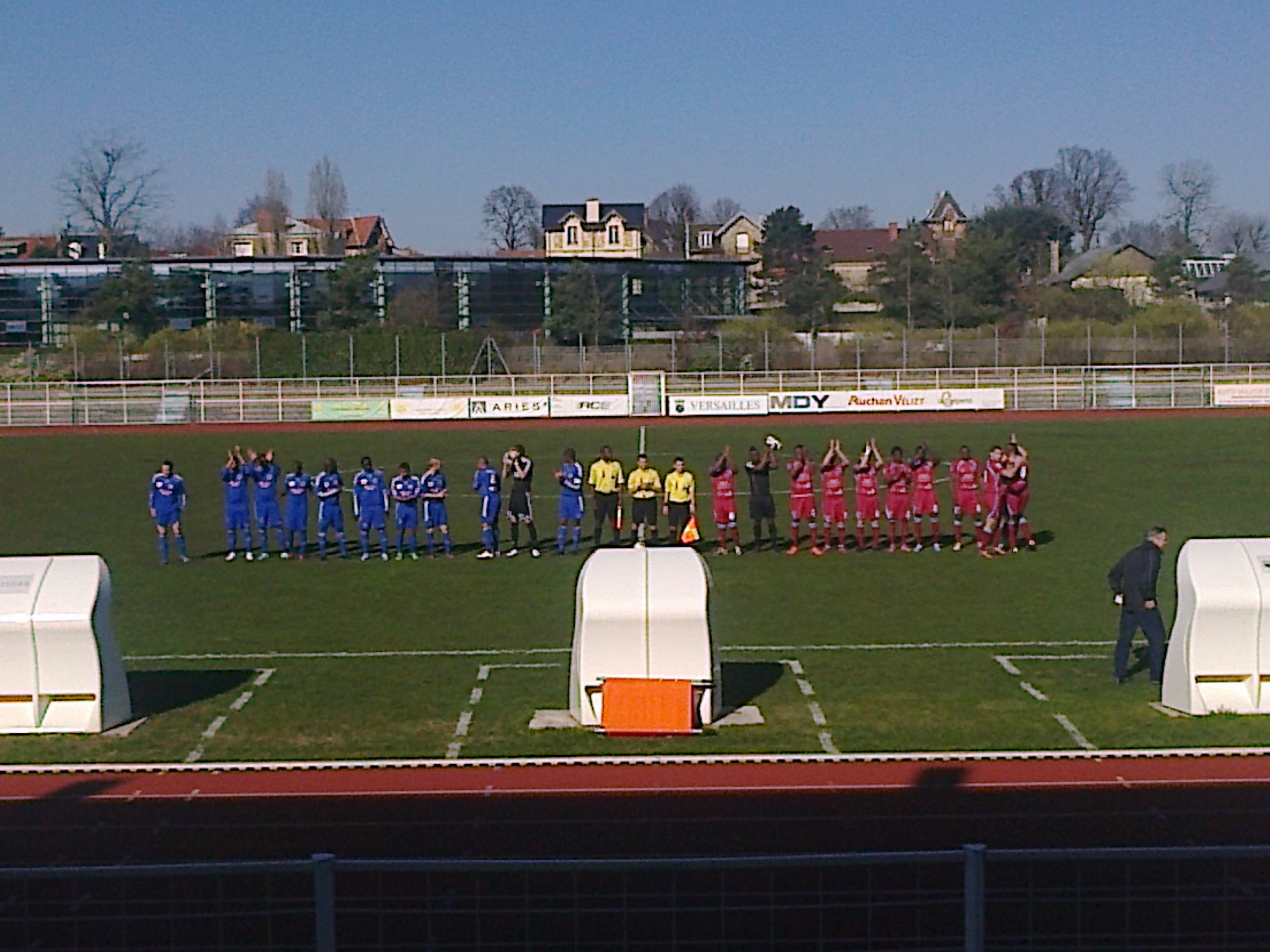 Présentation des équipes lors du match FC Versailles 78 - Les Mureaux le 09 mars 2014 au stade Montbauron à Versailles.